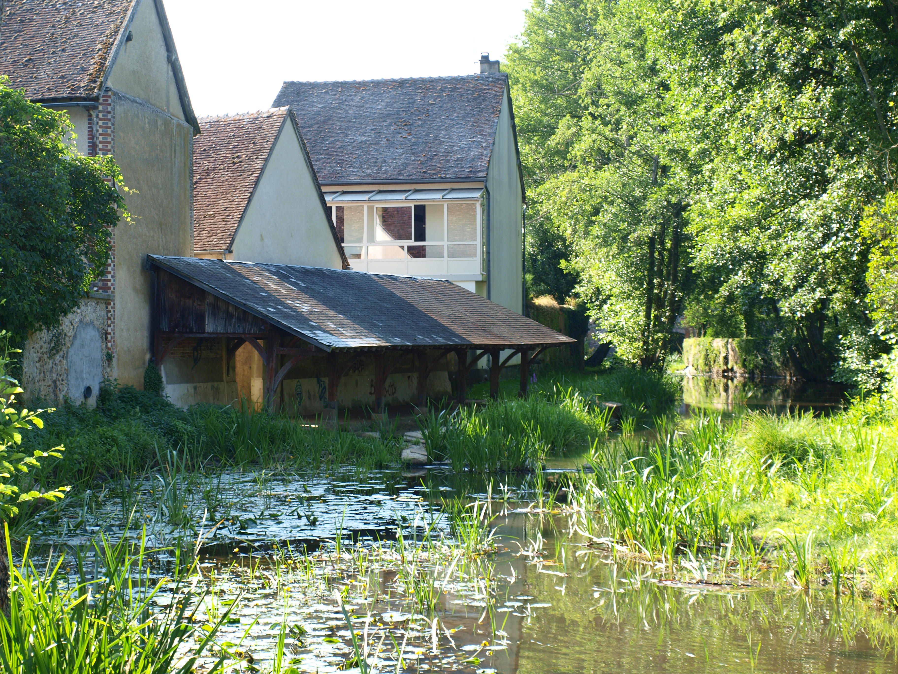 Mézilles (Yonne, France) ; lavoir sur le Branlin, vu du pont de la D 965 sur le bras du branlin le plus proche du centre ville. Vue vers l'aval.